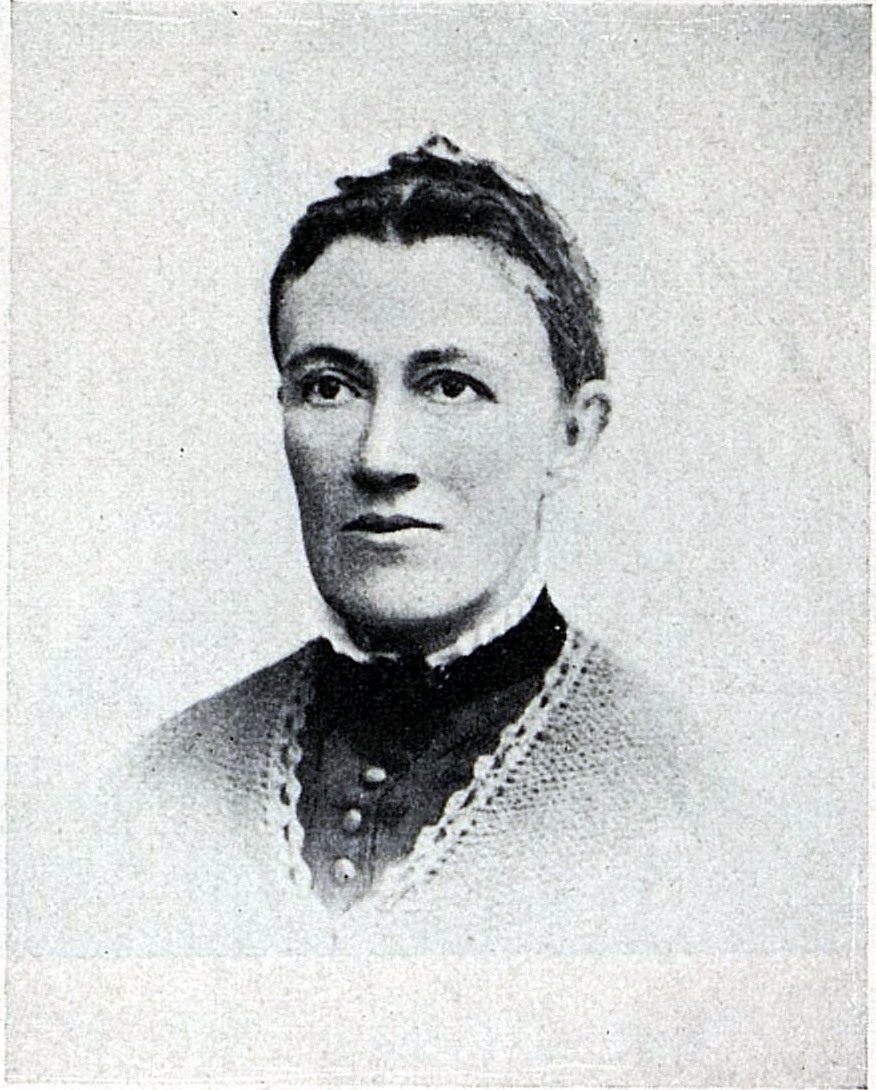 «Fredrikke Sophie Christensen, født Elster», i Hjalmar Christensen: Skeid (yttre). Bergen, 1922, s. 48. Sophie Christensen var mor til forfatteren Hjalmar Christensen.